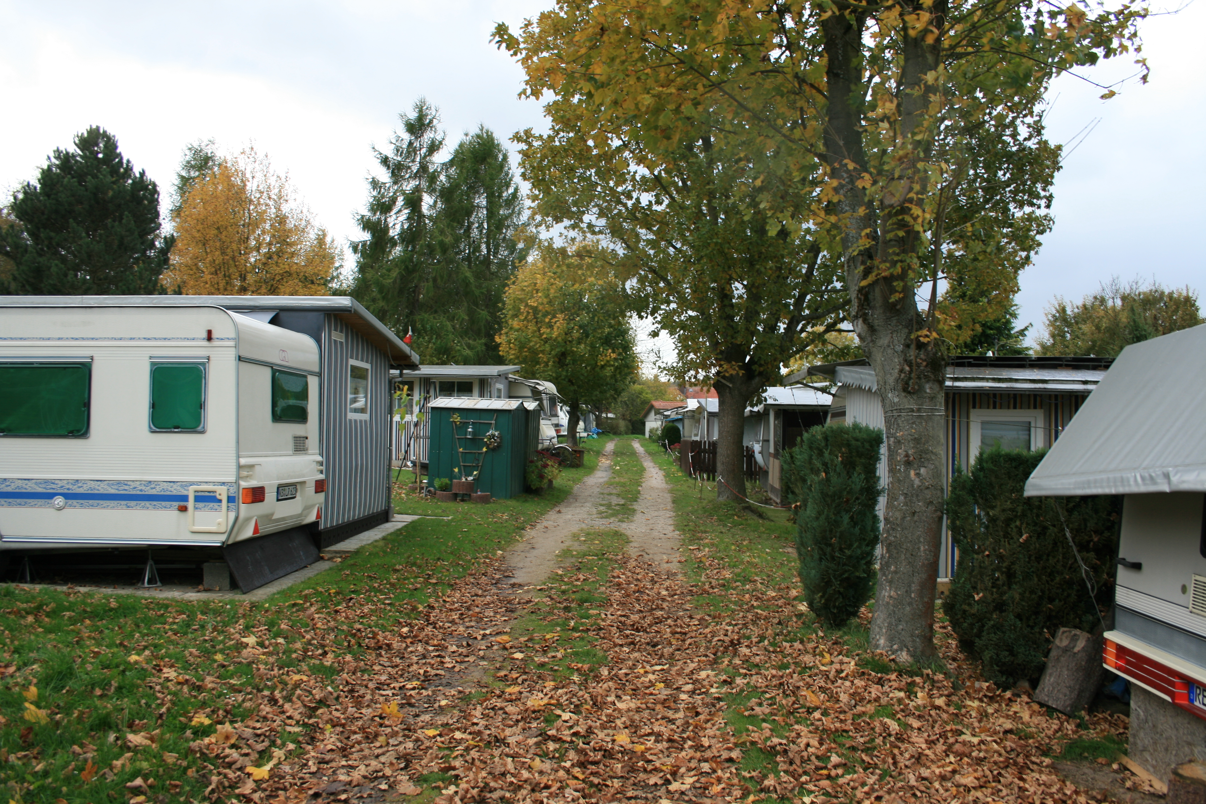 Dauercamper auf dem Campingplatz von Asel-Süd (Gemeinde Vöhl) am Edersee; Hessen/Deutschland.